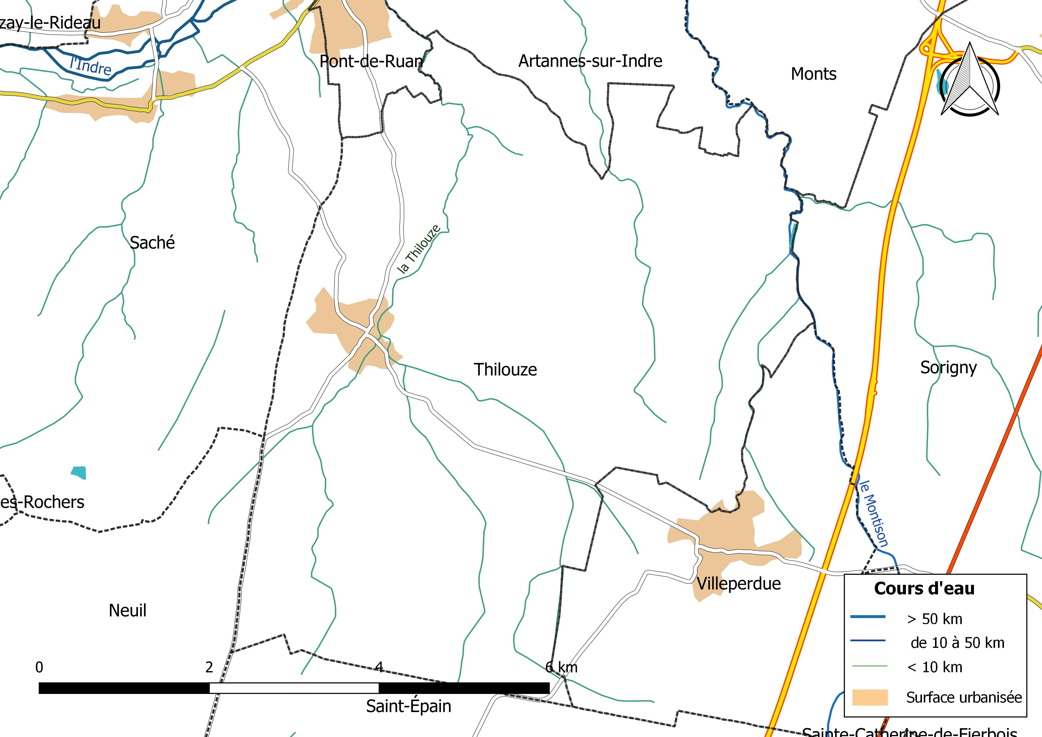 Carte du réseau hydrographique de la commune de Thilouze (France).